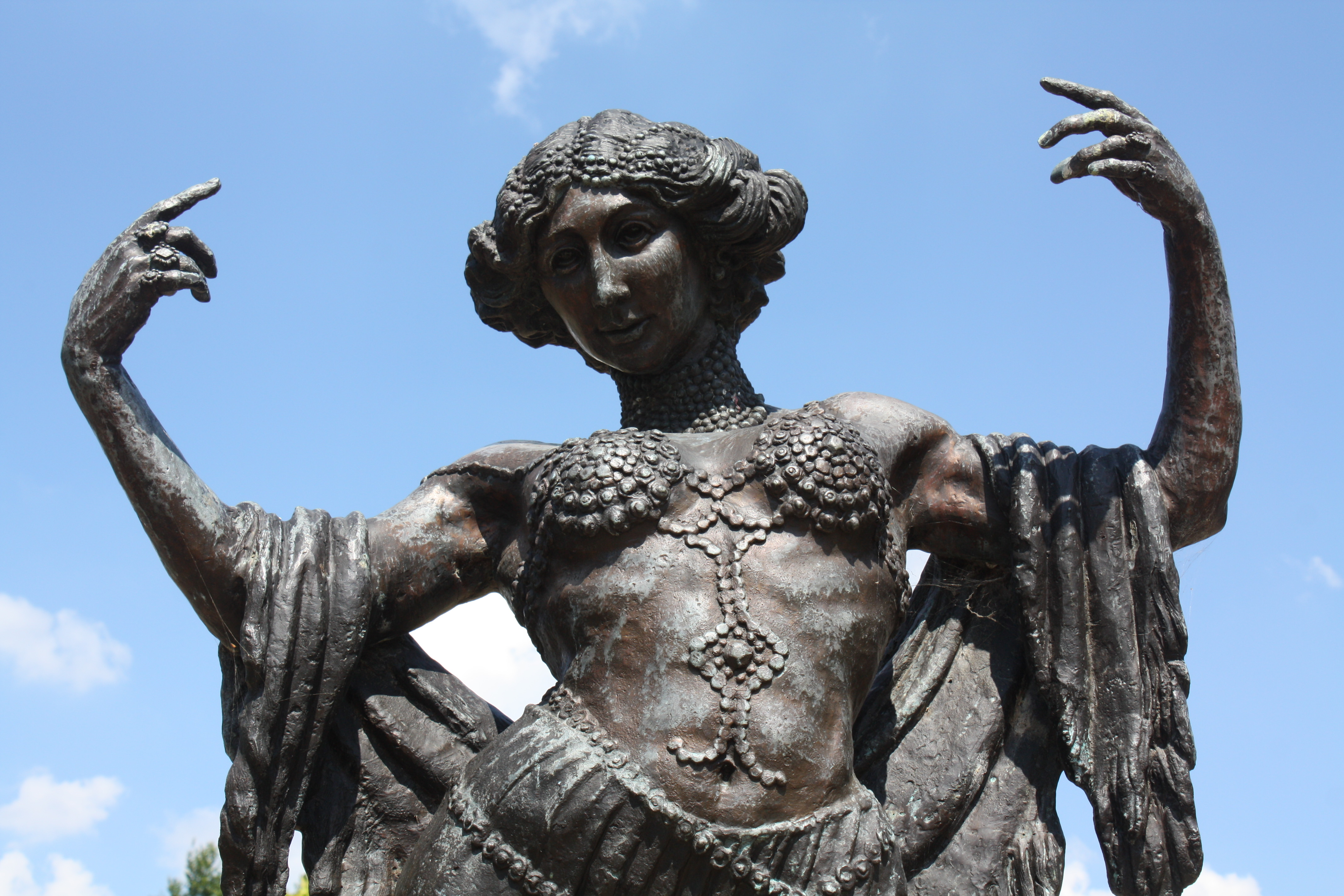 A Bela Otero (Valga, Pontevedra)